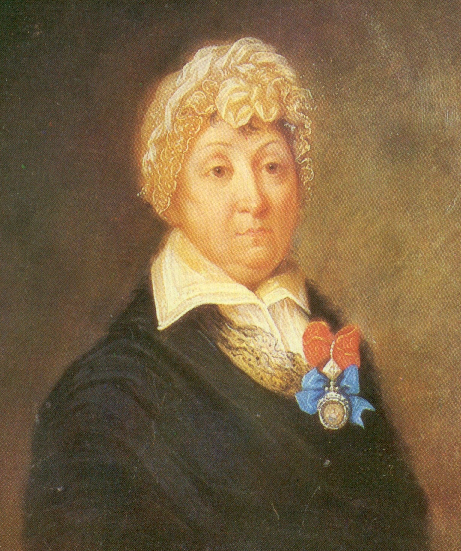 Графиня Елизавета Васильевна Зубова (1742-1813), ур. Воронова